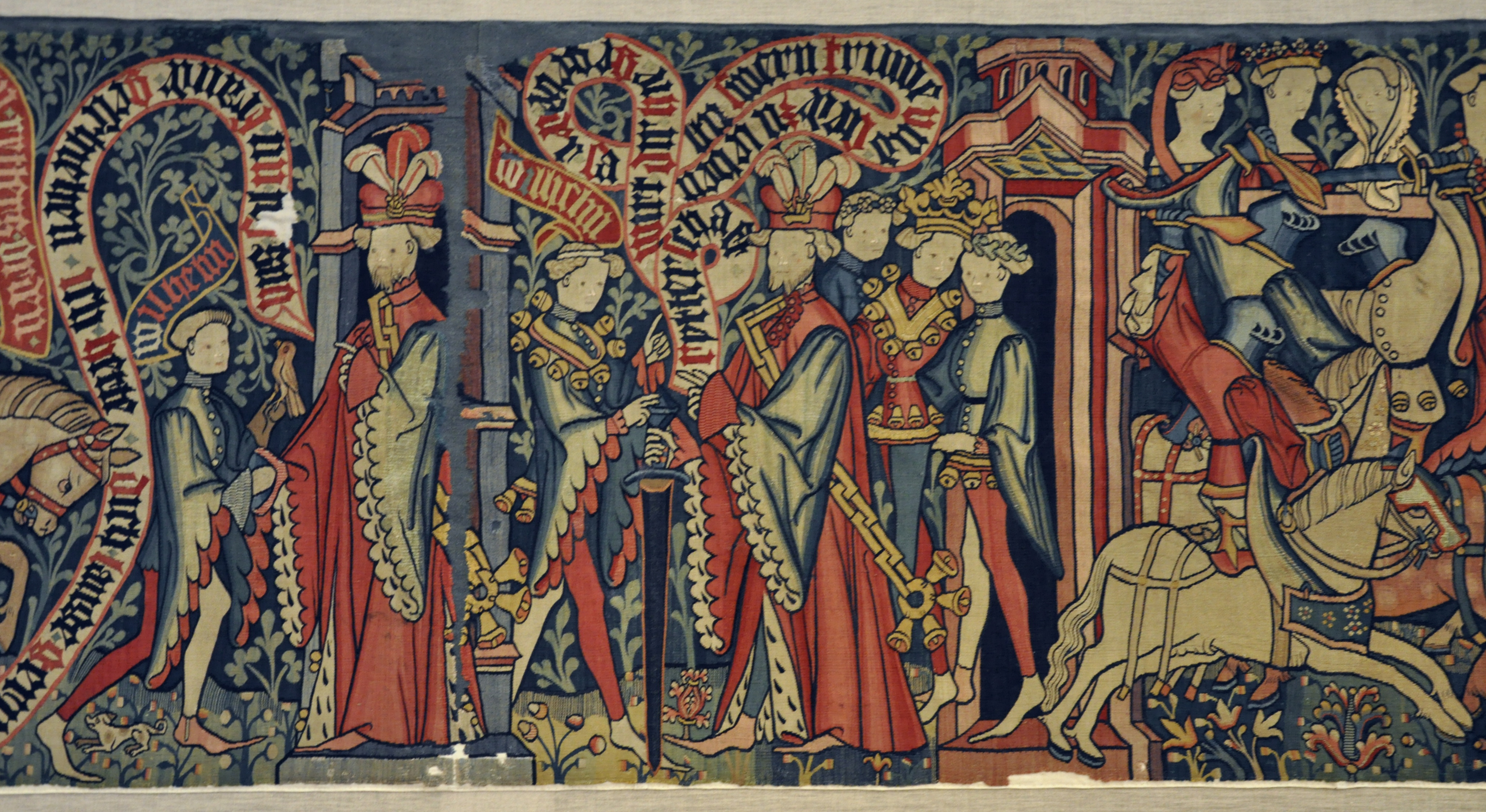 Wandbehang, Mittelrheingebiet, um 1410–1430; Wolle gewirkt. Motiv: Liebesgeschichte des Wilhelm von Orlens und der Königstochter Amelie von England. Museum für Angewandte Kunst, Frankfurt, Inv. Nr. 6809 (1929 aus der Fürstl. Hollenzollernschen Sammlung Schloss Sigmaringen erworben)